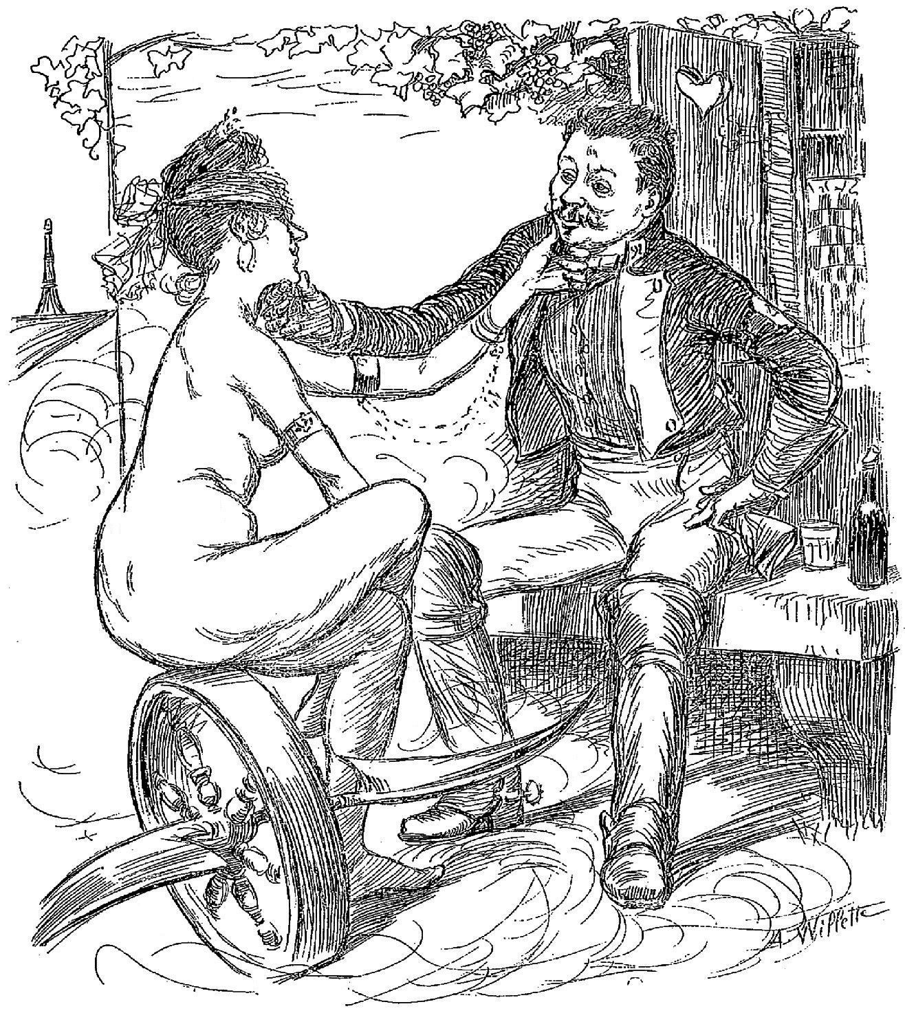 "Jules Roques, directeur du Courrier français" (Reprise du dessin publié dans le Courrier français du 11 septembre 1892).